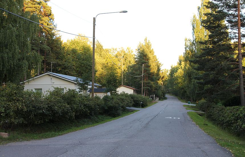 Korpitie, Vantaan Petaksen asuinalueella. Huom: Muista säilyttää viittaus kuvaajaan, mikäli käytät kuvaa.